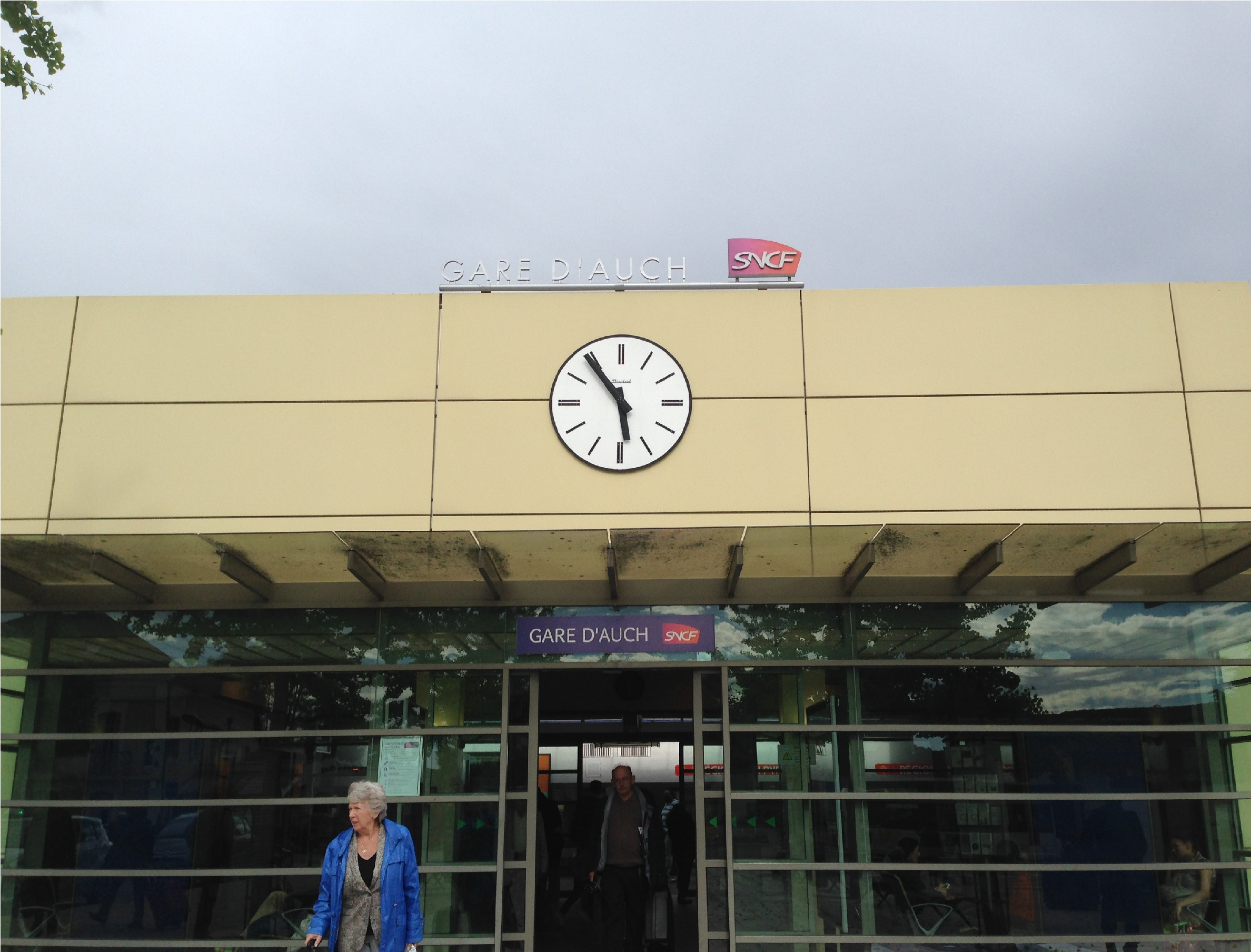 Gare d'Auch